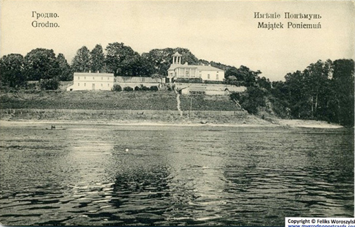 Сядзіба Панямонь